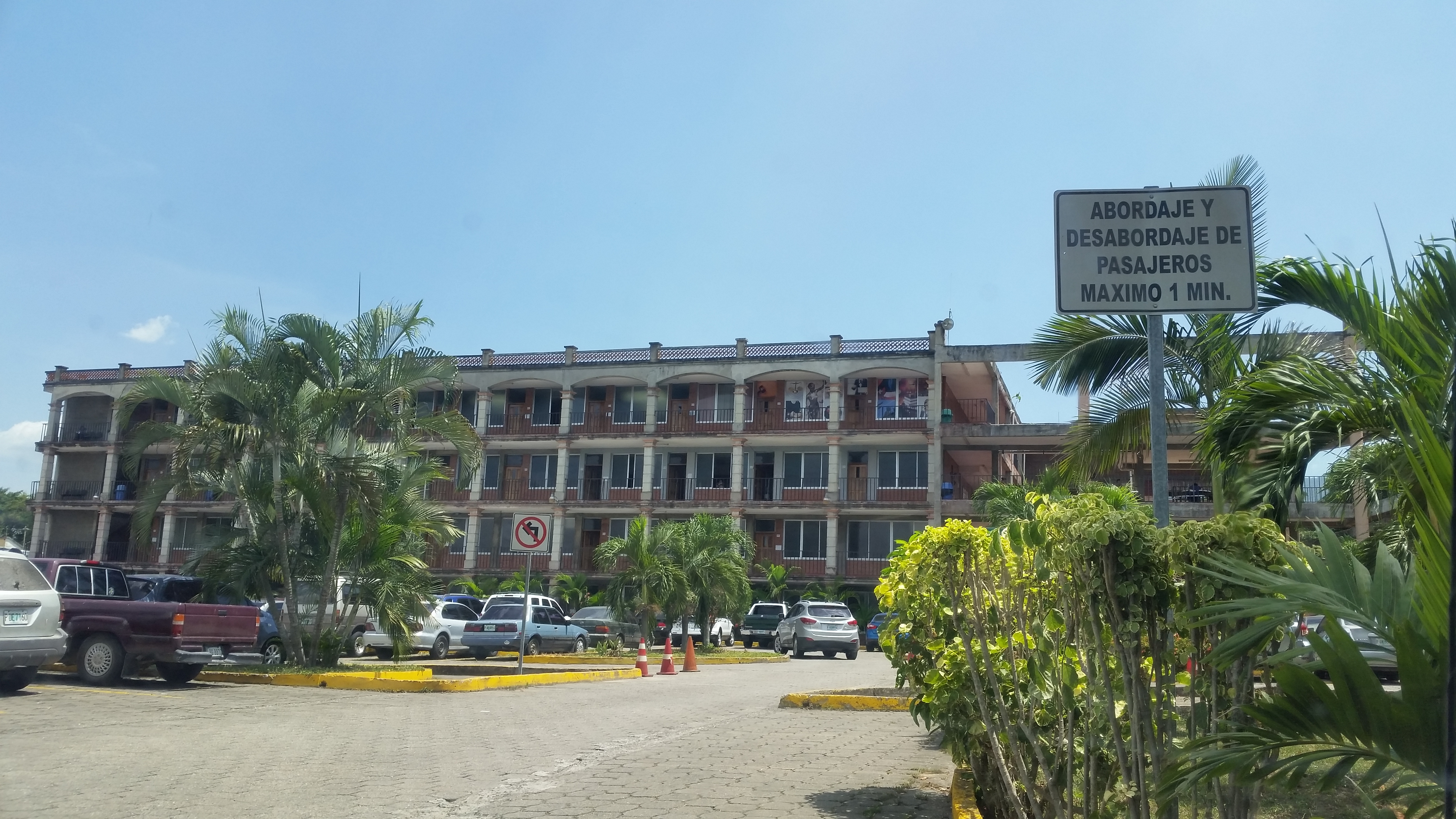 Universidad Catolica de San Pedro Sula